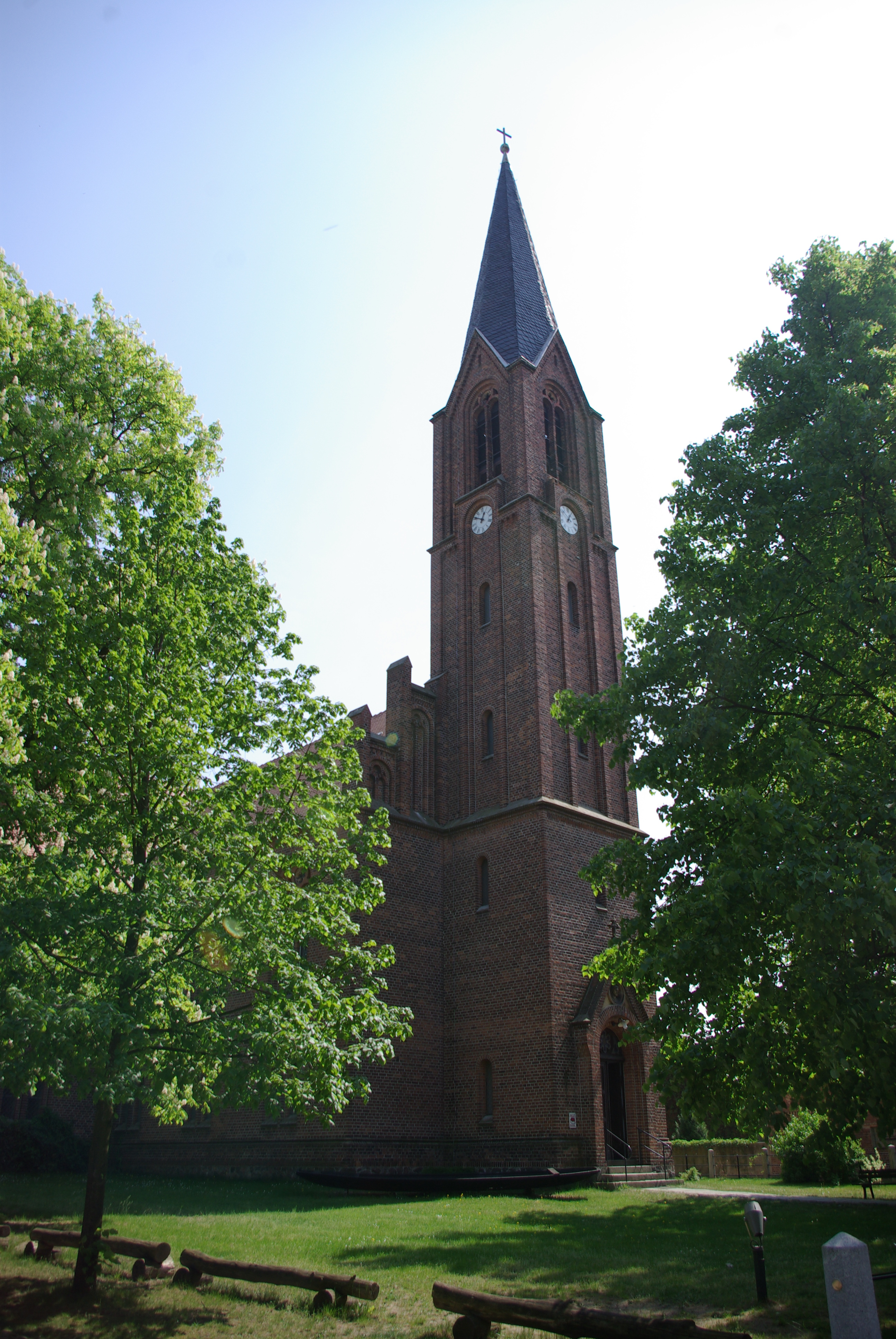 Neu-Zauche in Brandenburg. Die Kirche wurde von 1859 bis 1862 erbaut und steht unter Denkmalschutz.